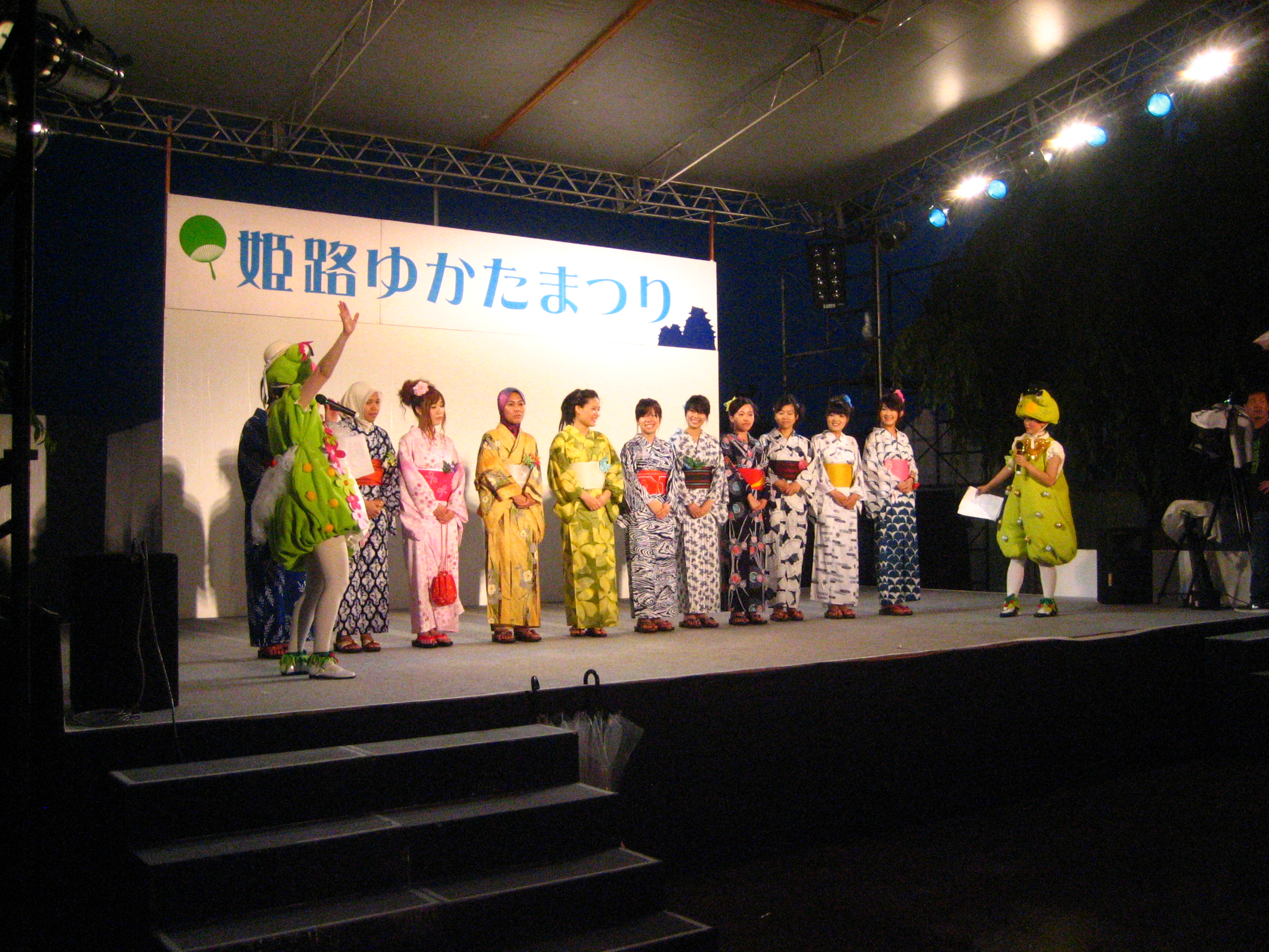 2009年6月22日から23日にかけて、姫路市大手前通りにて開催された「姫路ゆかた祭」。2つ日間にかけて行なわれた祭の風景。注意:ファイル番号及び日時は撮影時系列純にはなっておりません。また、性別、年齢、国籍などによる分類は推定で行なっております。 野外ステージの様子。